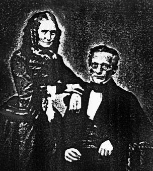 Ludwig Ahron Gans mit Gattin; aus dem Privatbesitz Angela von Gans